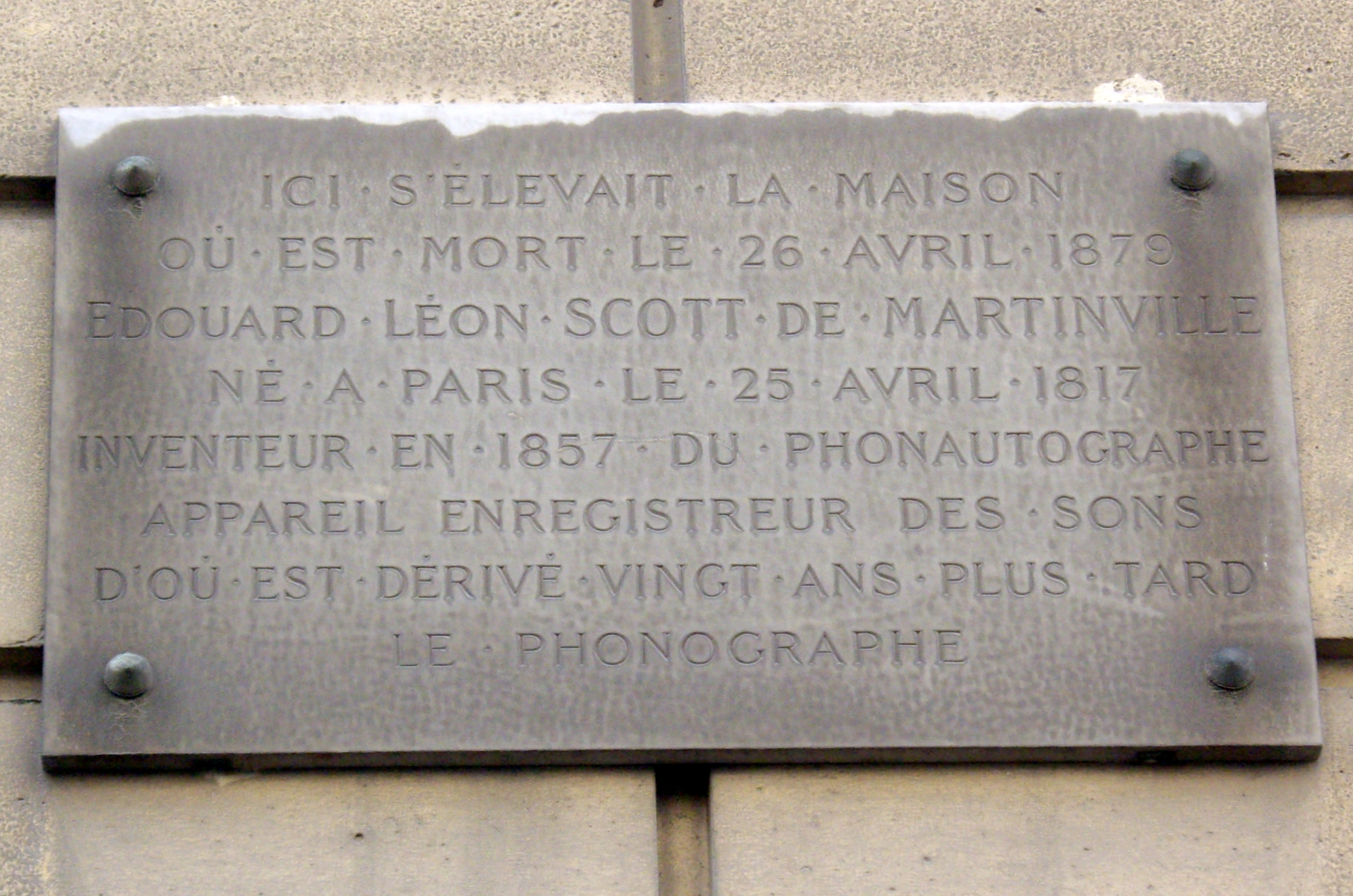 Plaque commémorative apposée au n° 9 de la rue Vivienne, Paris 2e.« Ici s'élevait la maison où est mort le 26 avril 1879 Edouard-Léon Scott de Martinville, né à Paris le 25 avril 1817, inventeur en 1857 du phonautographe, appareil enregistreur des sons d'où est dérivé vingt ans plus tard le phonographe. »